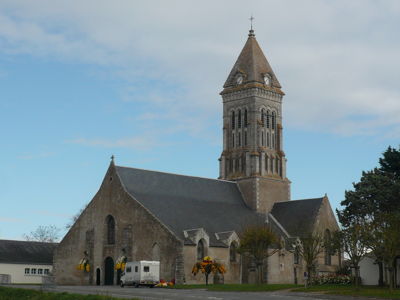 Église de Noirmoutier